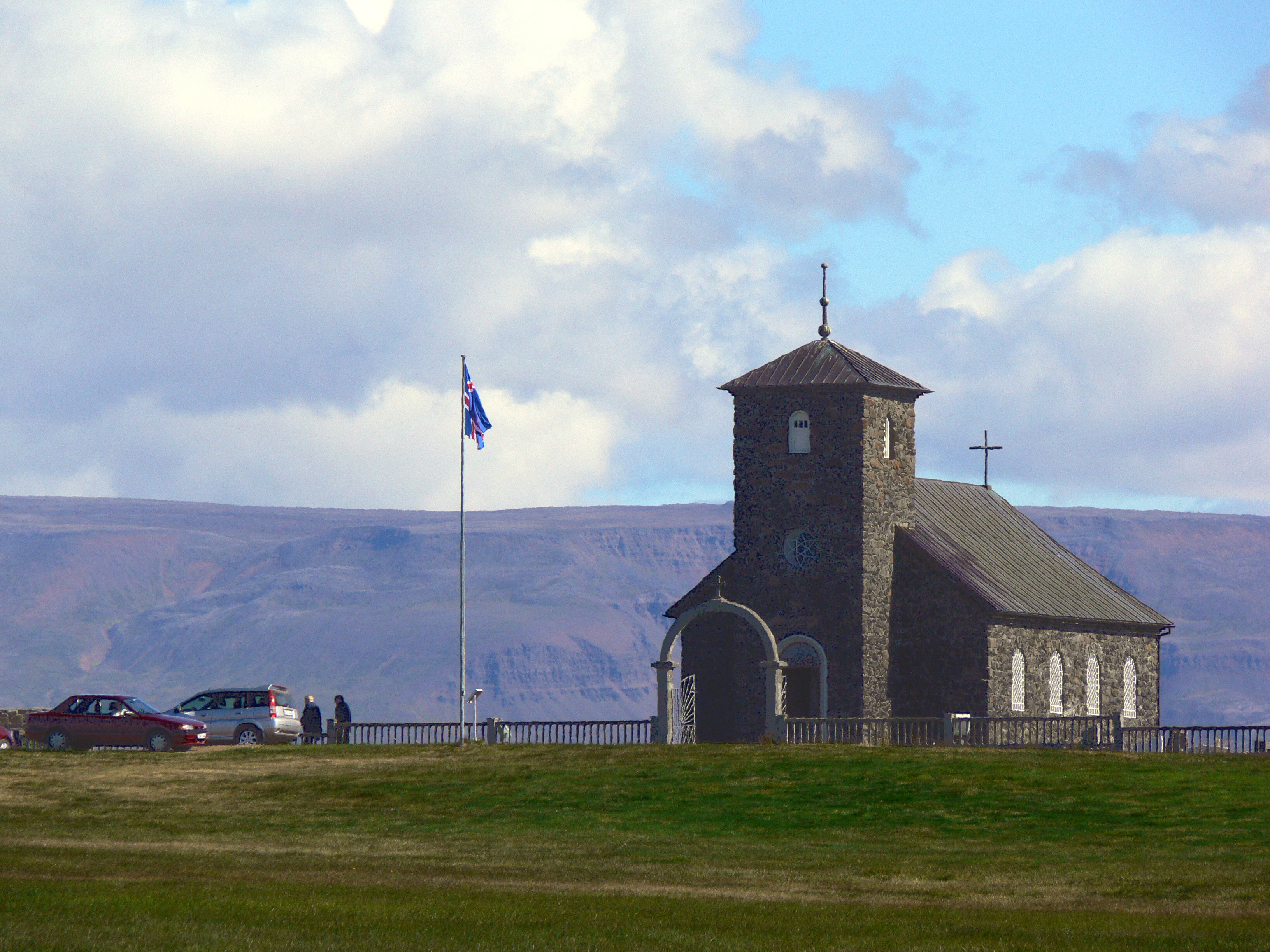 Kirche in Þingeyrar in Nordisland